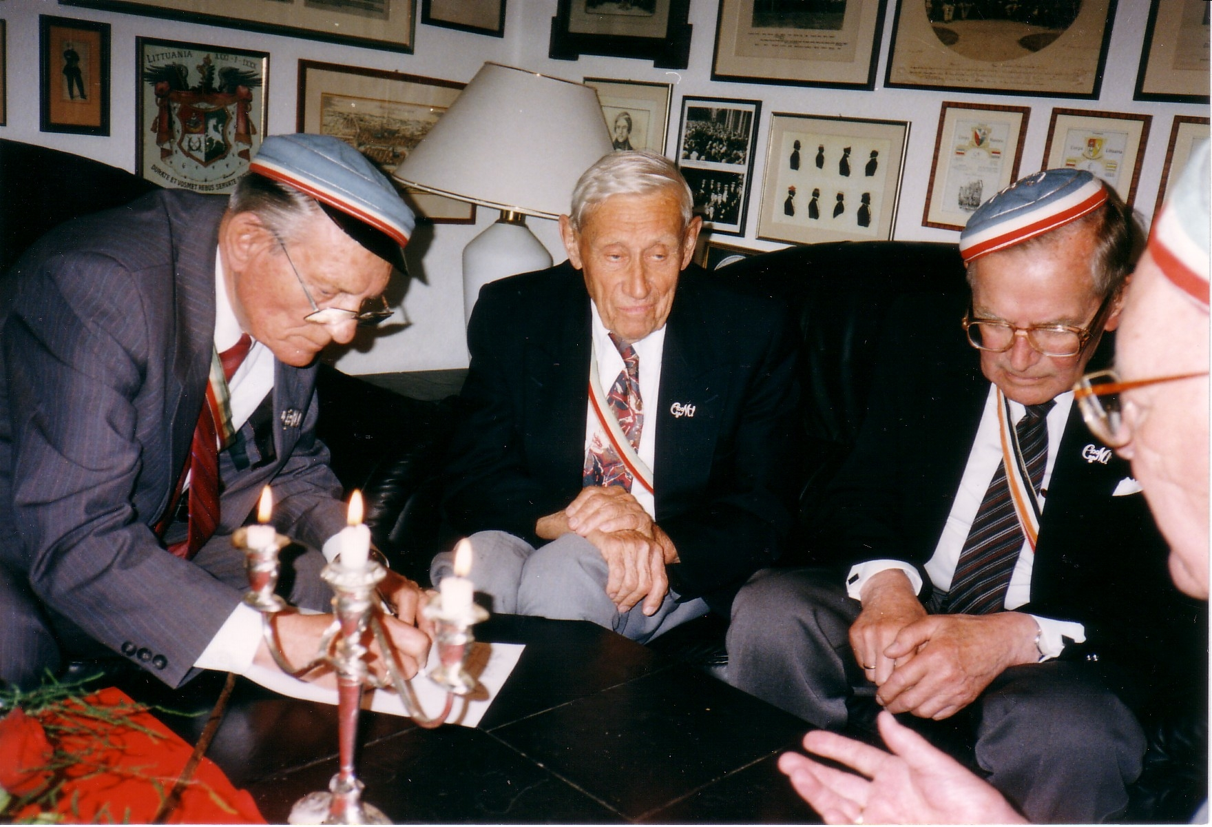 Rekonstitution des Corps Masovia am 14. Juni 1997 in Kiel. Abgebildet sind Klaus Balduhn, Helmut Haneke, Hermann Petersen und Benno Gliemann (l–r).